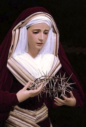 María Santísima de la Esperanza, vestida de hebrea